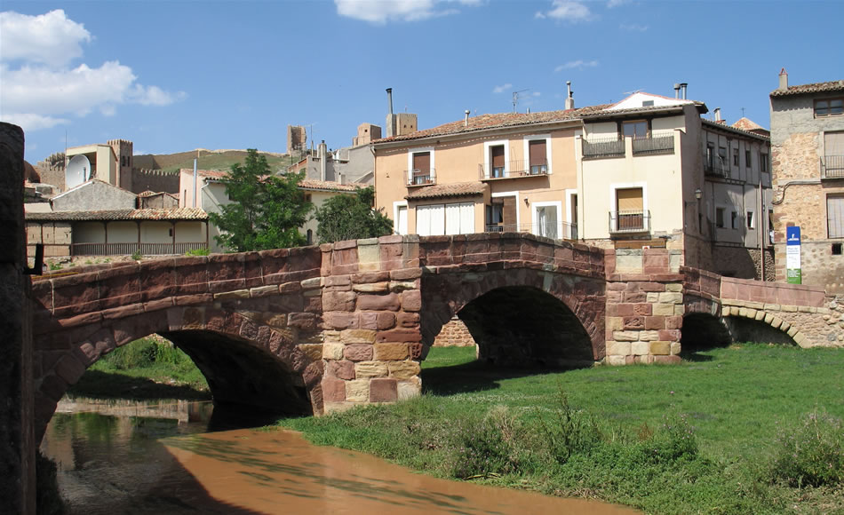 Puente Viejo. Molina de Aragón (Guadalajara, España)